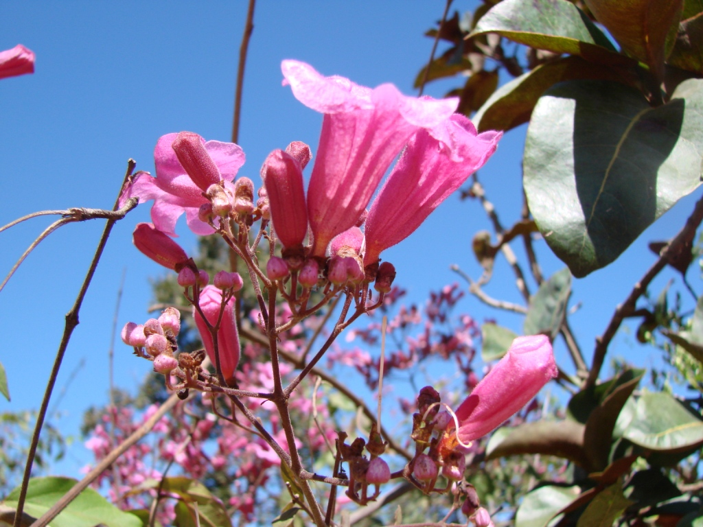 Arrabidaea pulchra, Bignoniaceae - Brasilien/Brasil: Distrito Federal, Jardim Botanico de Brasília